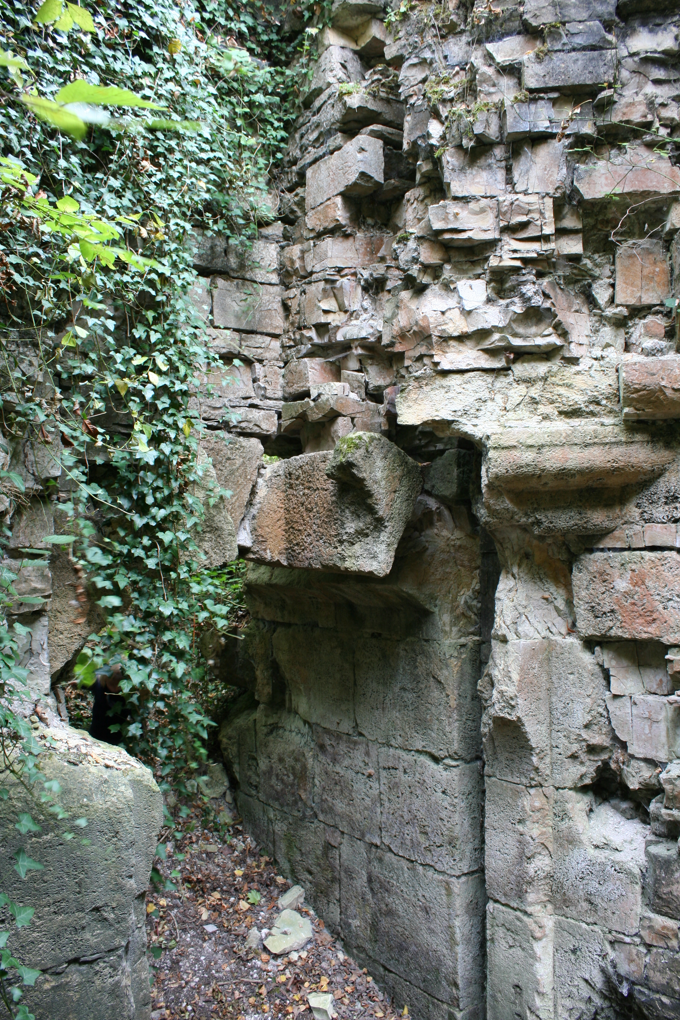 Château de Bainville-aux-Miroirs - Système de défense du donjon - Cheminée de l'assommoir et rainures de la herse.